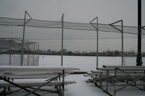 Info Sandflora Mainz: Nach den heftigsten Schneefällen seit 15 Jahren im Rhein-Main-Gebiet ist am 04. März 2006 nicht einmal mehr der Mound auszumachen